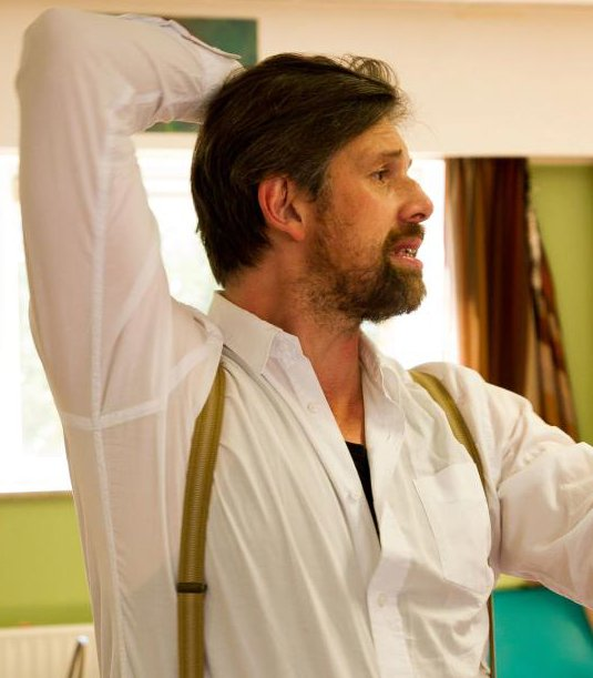 Johan Heldenbergh (1967), Vlaams acteur en regisseur